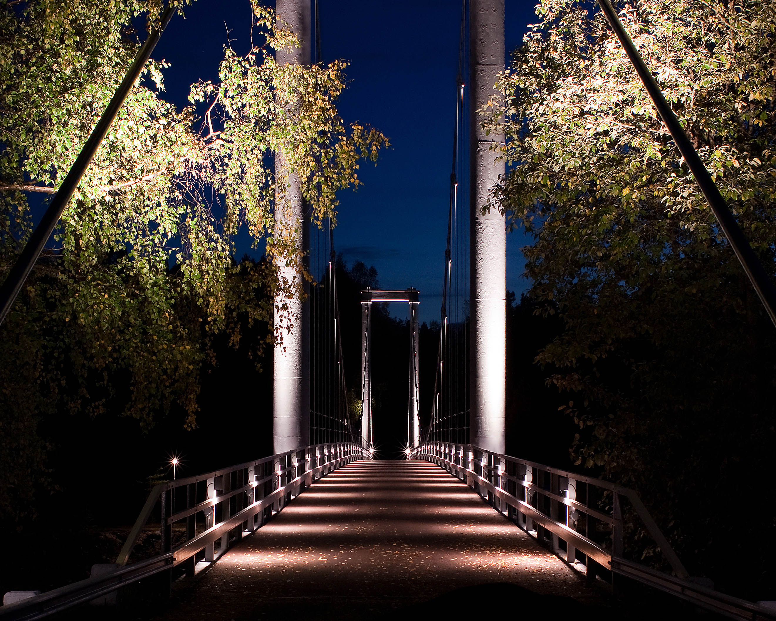 Svedjebron är en hängbro över Lule älv belägen nedströms Bodens kraftstation. Bron uppfördes 1941 och har en längd på 198 meter och är 4 meter bred. Foto taget den 1 oktober 2010 klockan 19:57.